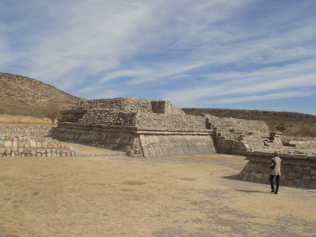 Template:Plazuelas, caracoles